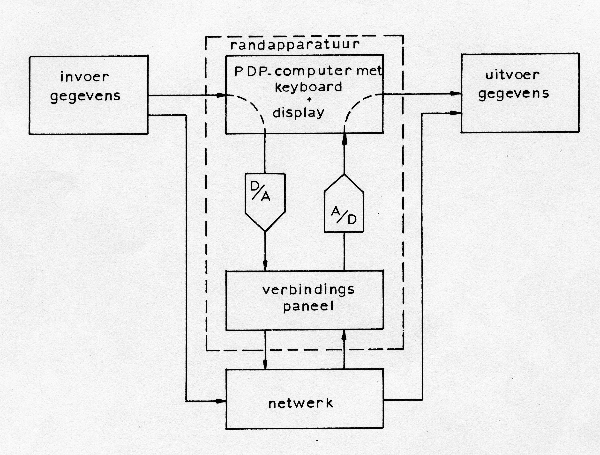 Blokschema Elektrisch Netwerkanalogon voor Grondwaterproblemen